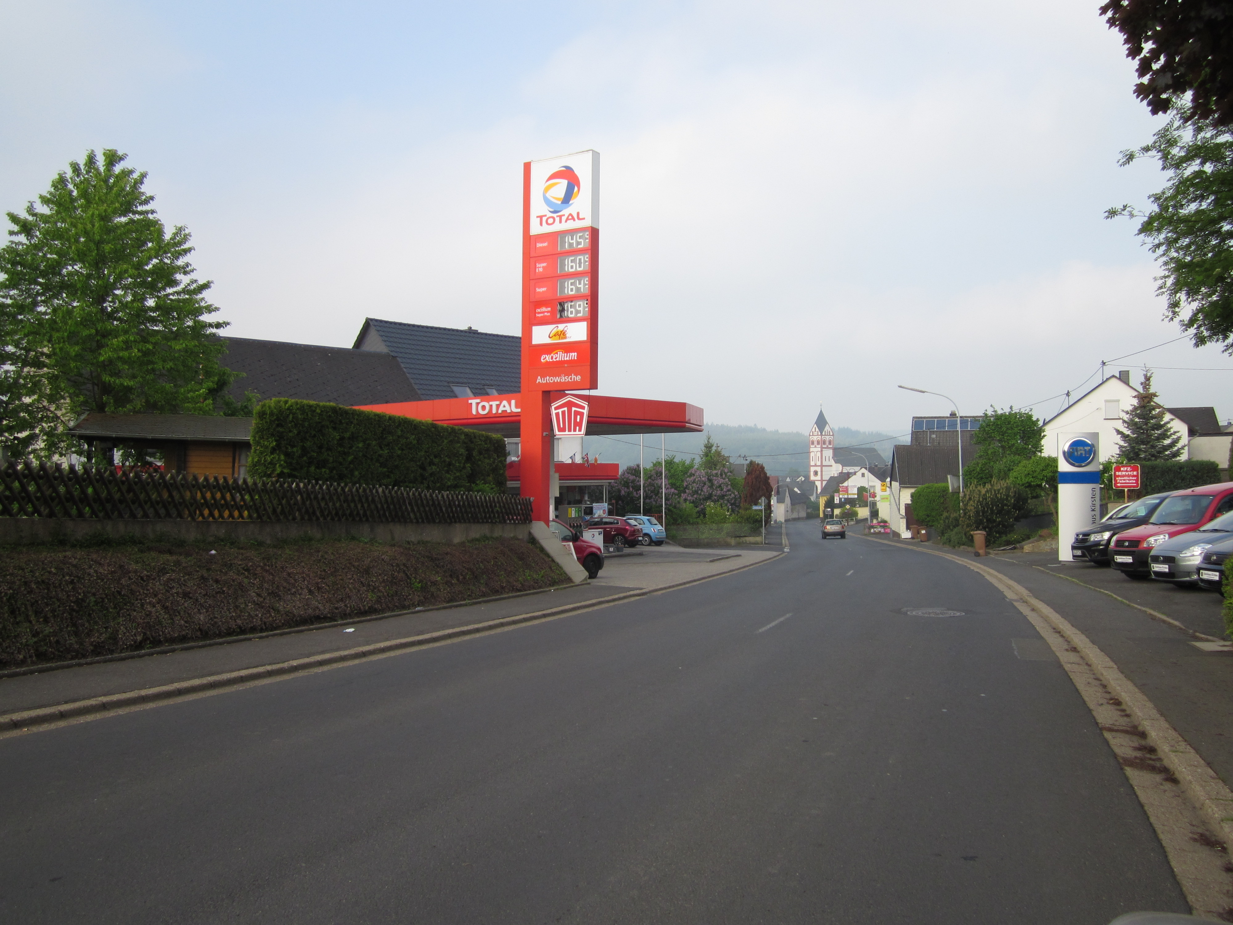 Dorpje Uersfeld